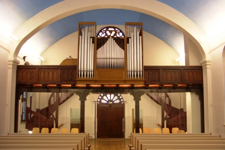 Orgelansicht Neuapostolische Kirche Coswig (Anhalt)